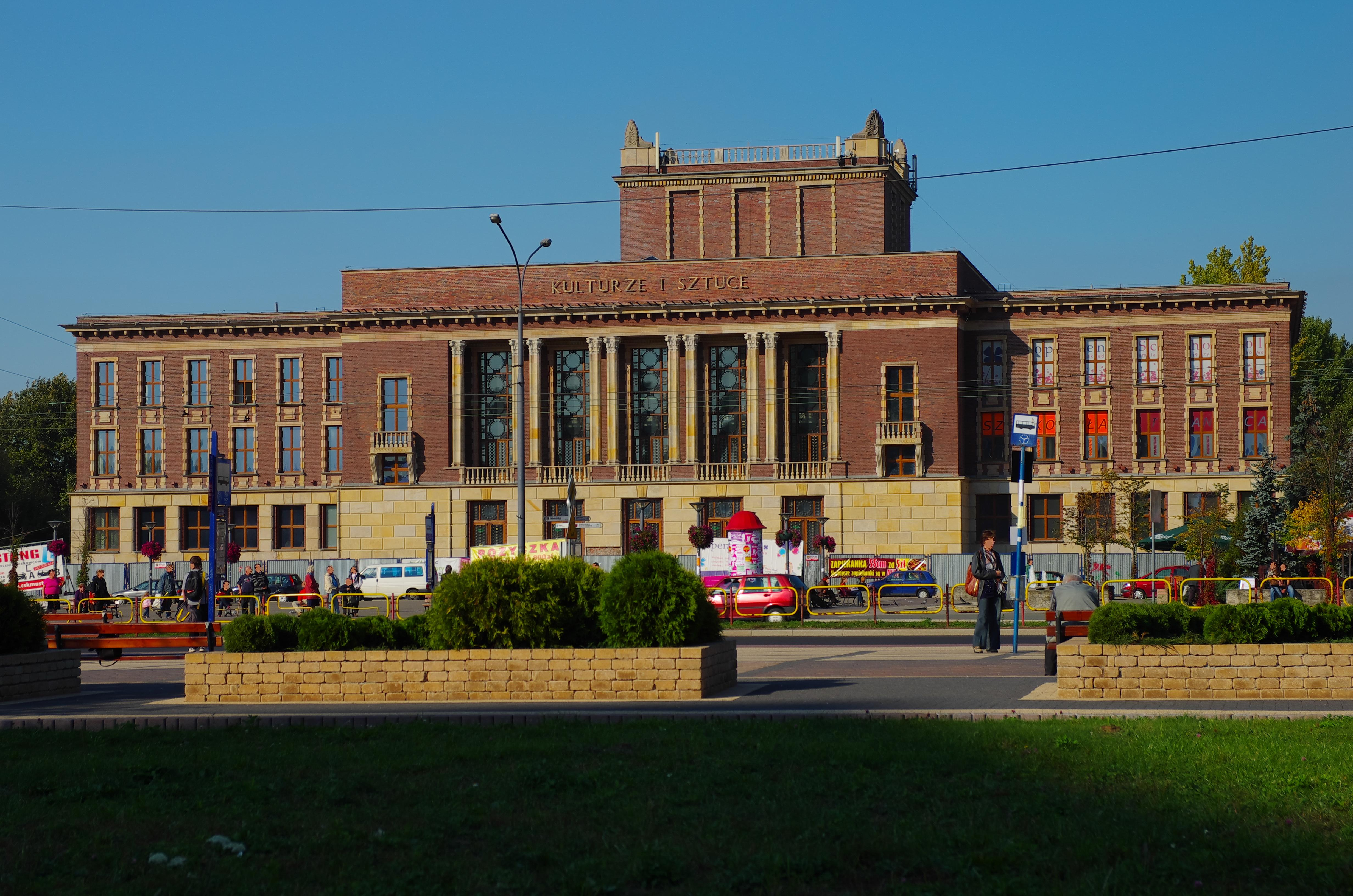 Dąbrowa Górnicza, plac Wolności 1 - budynek Pałacu Kultury Zagłębia (zabytek A 1240/79 z 22.11.1979)